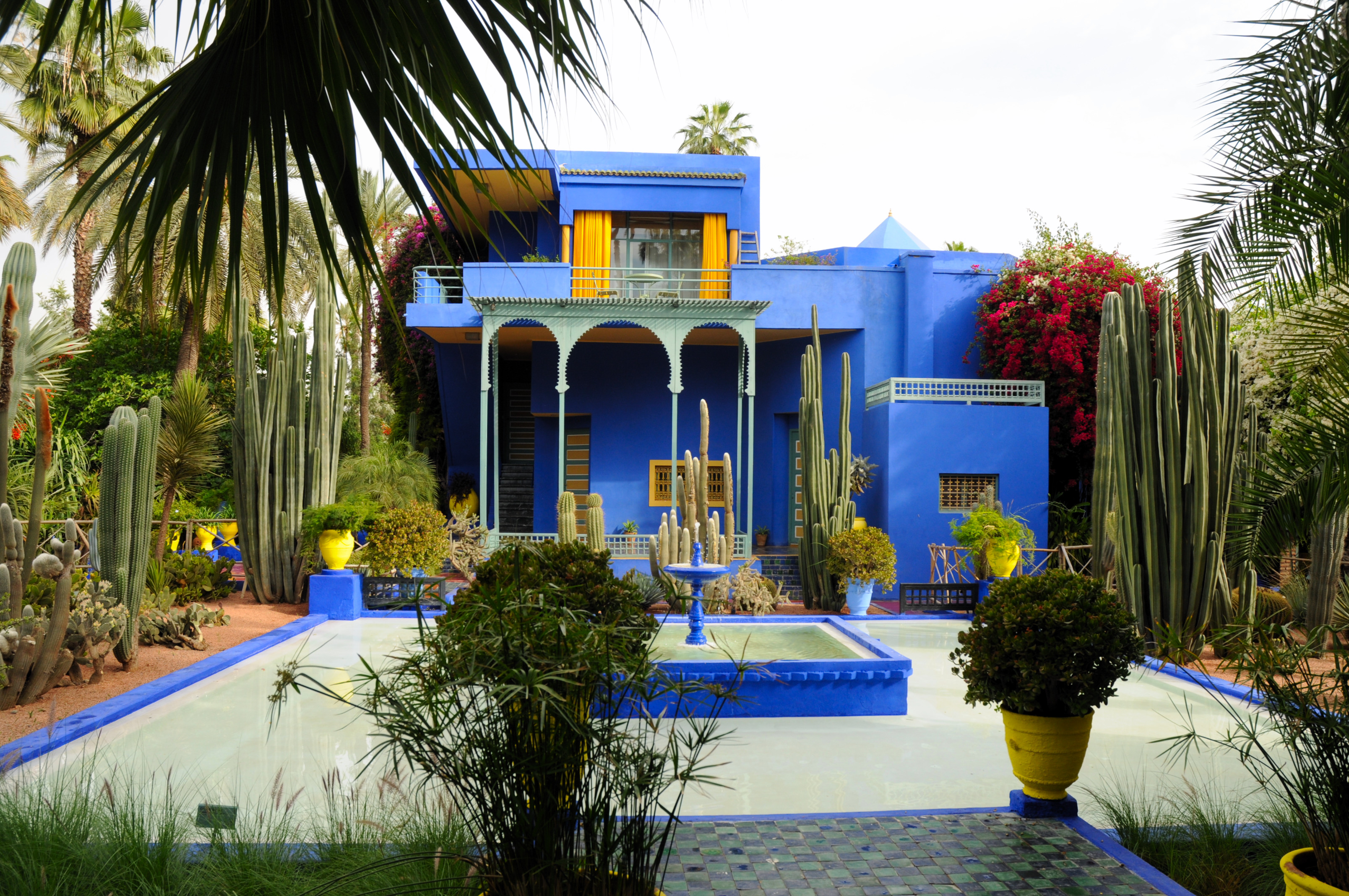 Le jardin Majorelle, Marrakech, Maroc